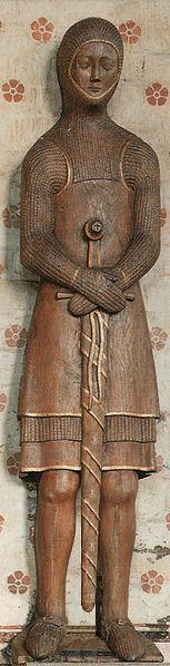 Helmoldus de Plesse / Helmold (III.) von Plesse Datum: Holzstatue aus dem ca. 13. Jahrhundert Urheber: unbekannt (Kunstwerk ohne Urheberschutz; nach eigenem Foto und Motivvorlage (bzgl. Schwert) mit PC-Software selbst am 12.06.2010 neu bearbeitet) Quelle: eigenes Privatfoto digital überarbeitet (abgebrochenes Schwert virtuell "restauriert")